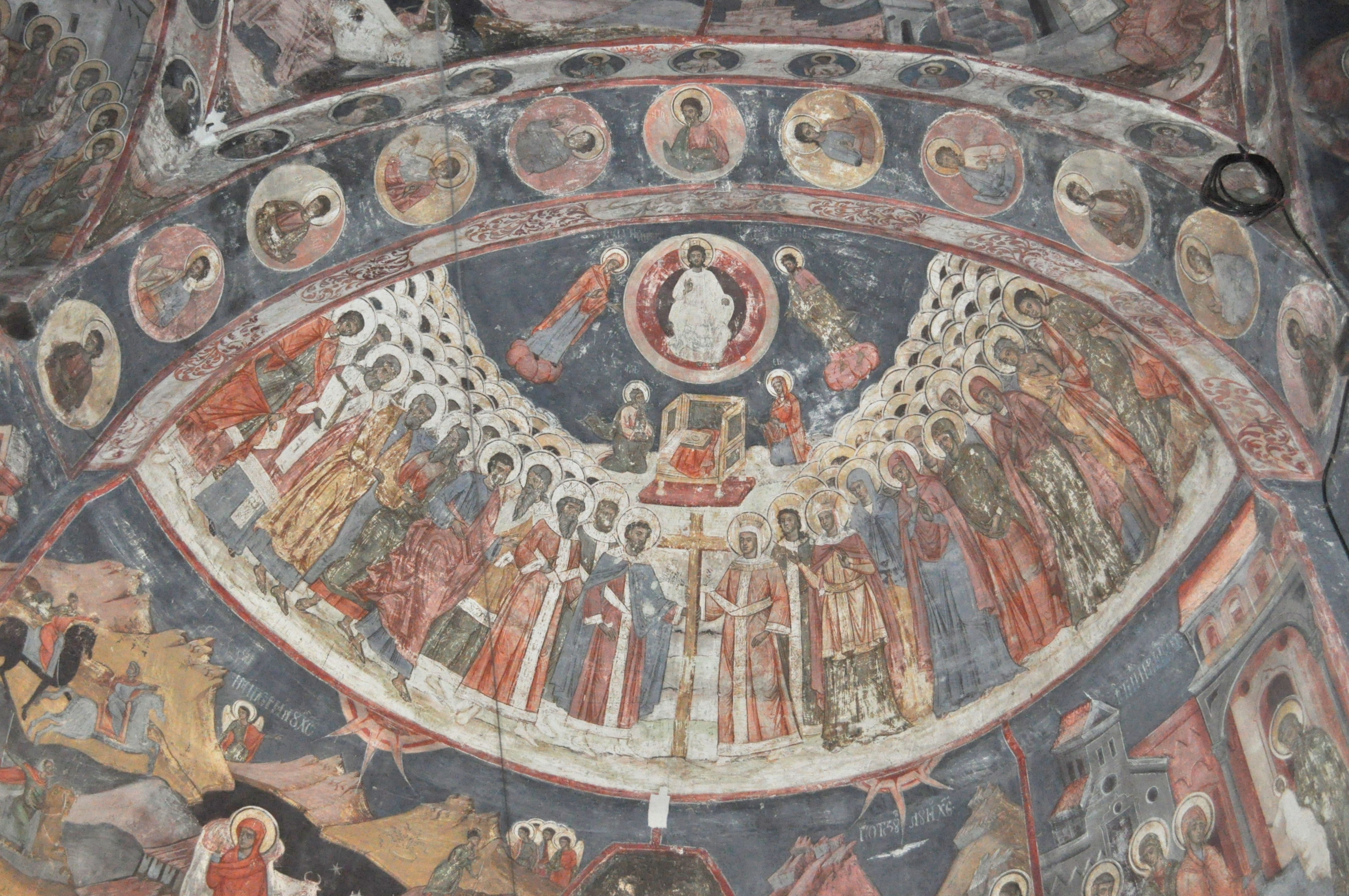 Biserica „Sfânta Treime”, sat Cerneți; comuna Șimian